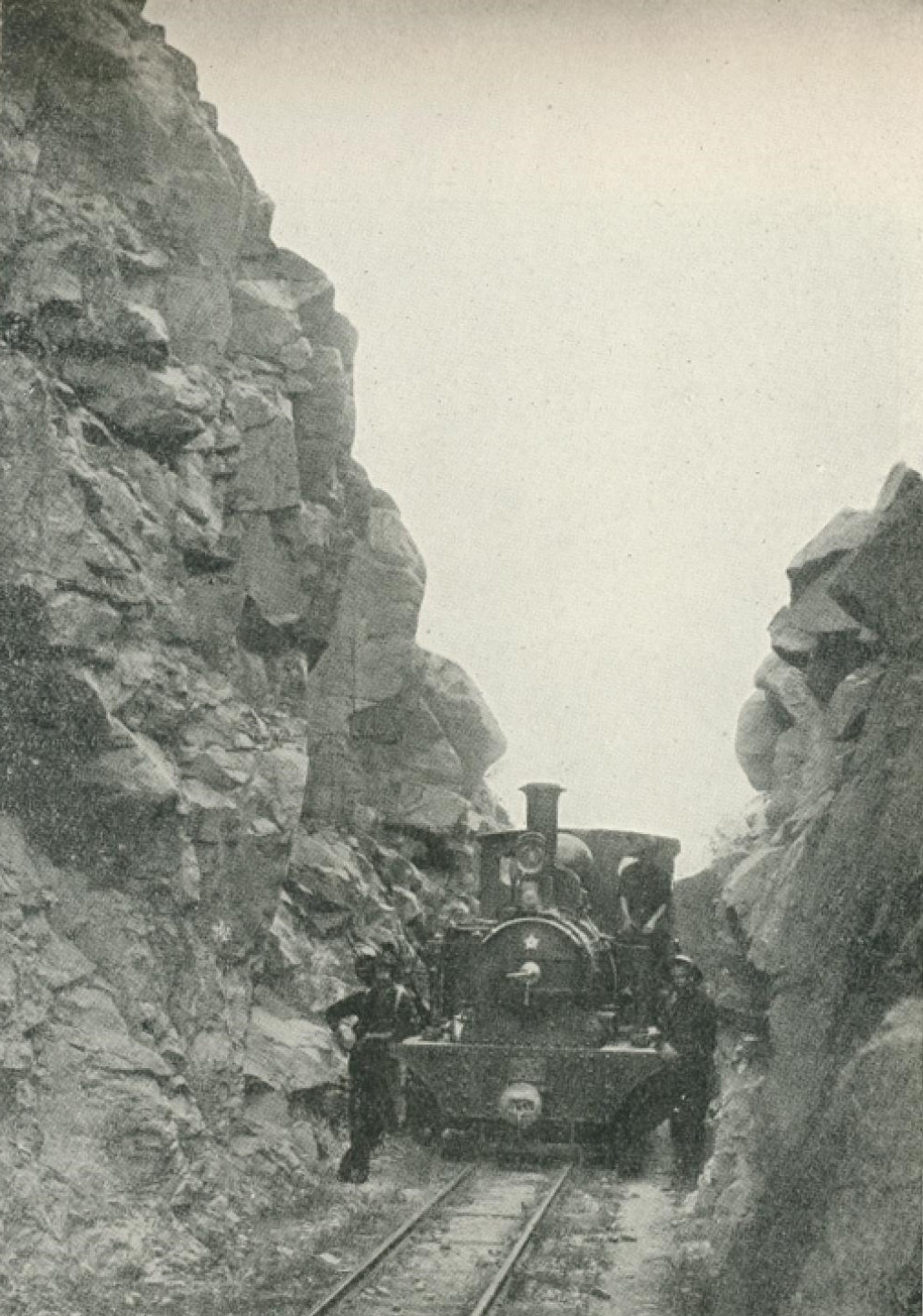 Cutting on the Stannary Hills Tramway